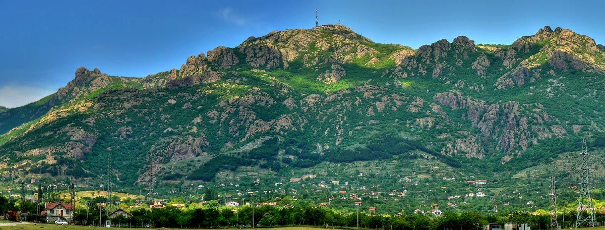 Панорама Карандила